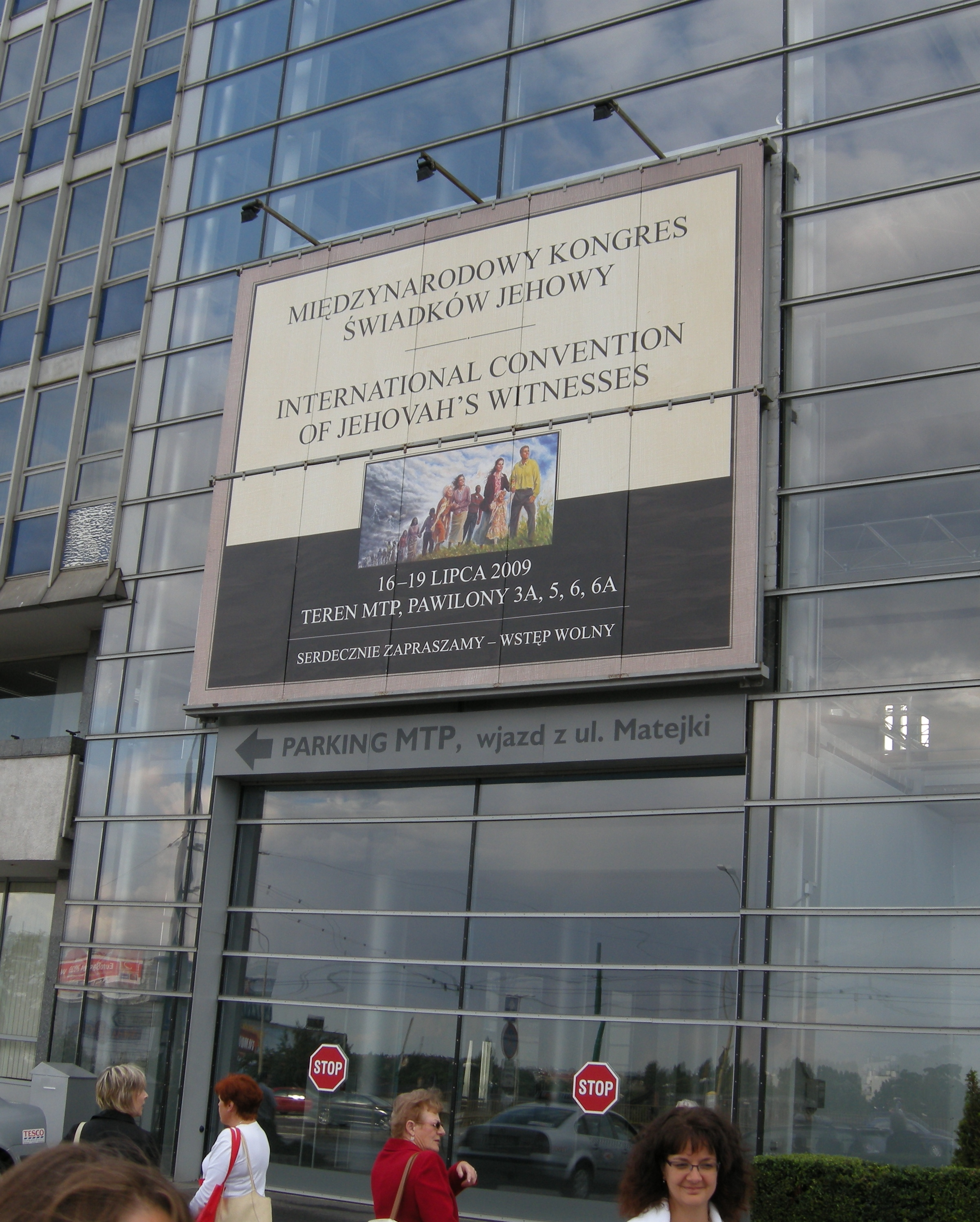 Zgromadzenie w Poznaniu 2009. Wejście do Międzynarodowych Targów Poznańskich.